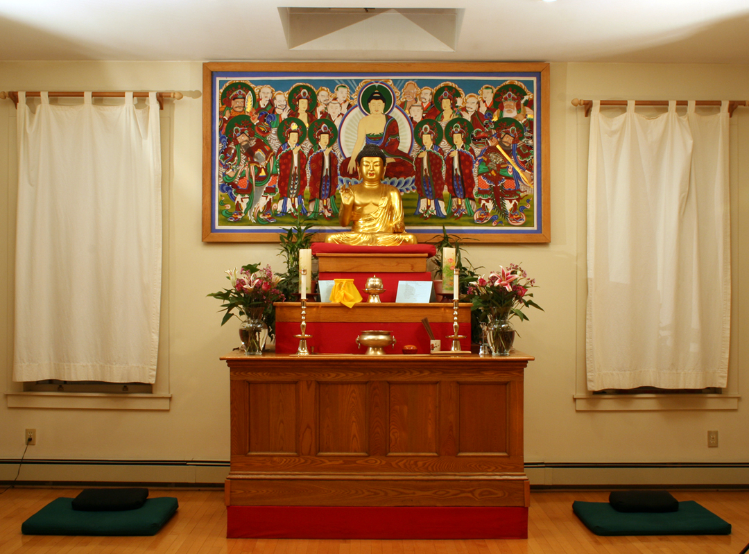 Dharma room at Cambridge Zen Center